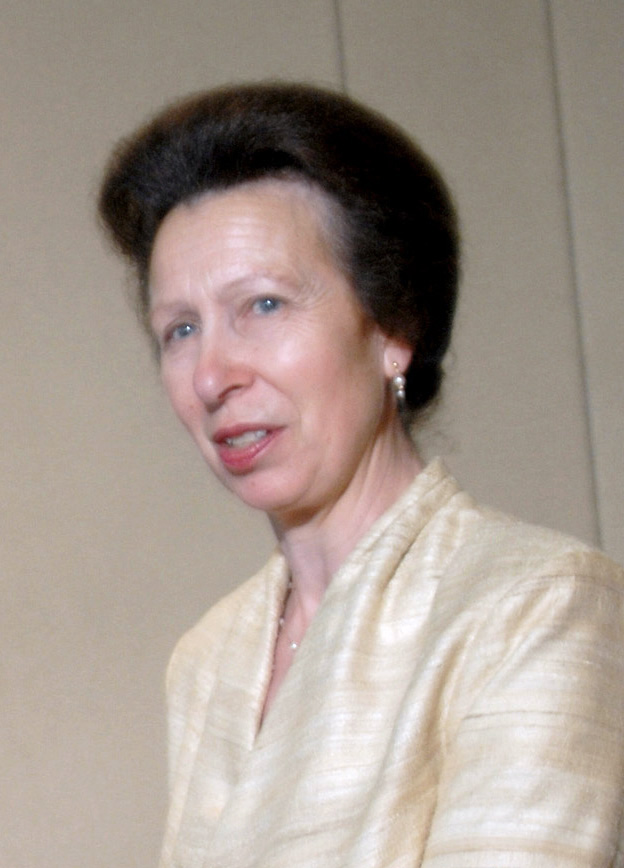 A princesa Ana, do Reino Unido, encontra-se com o presidente Luiz Inácio Lula da Silva em Brasília.